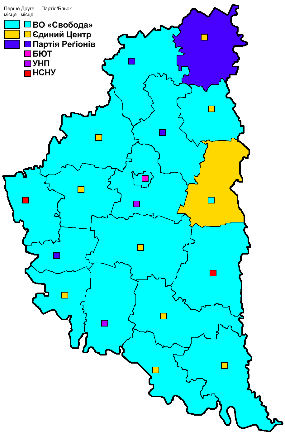 Підтримка партій та блоків на виборах до Тернопільської облради 2009 року. (